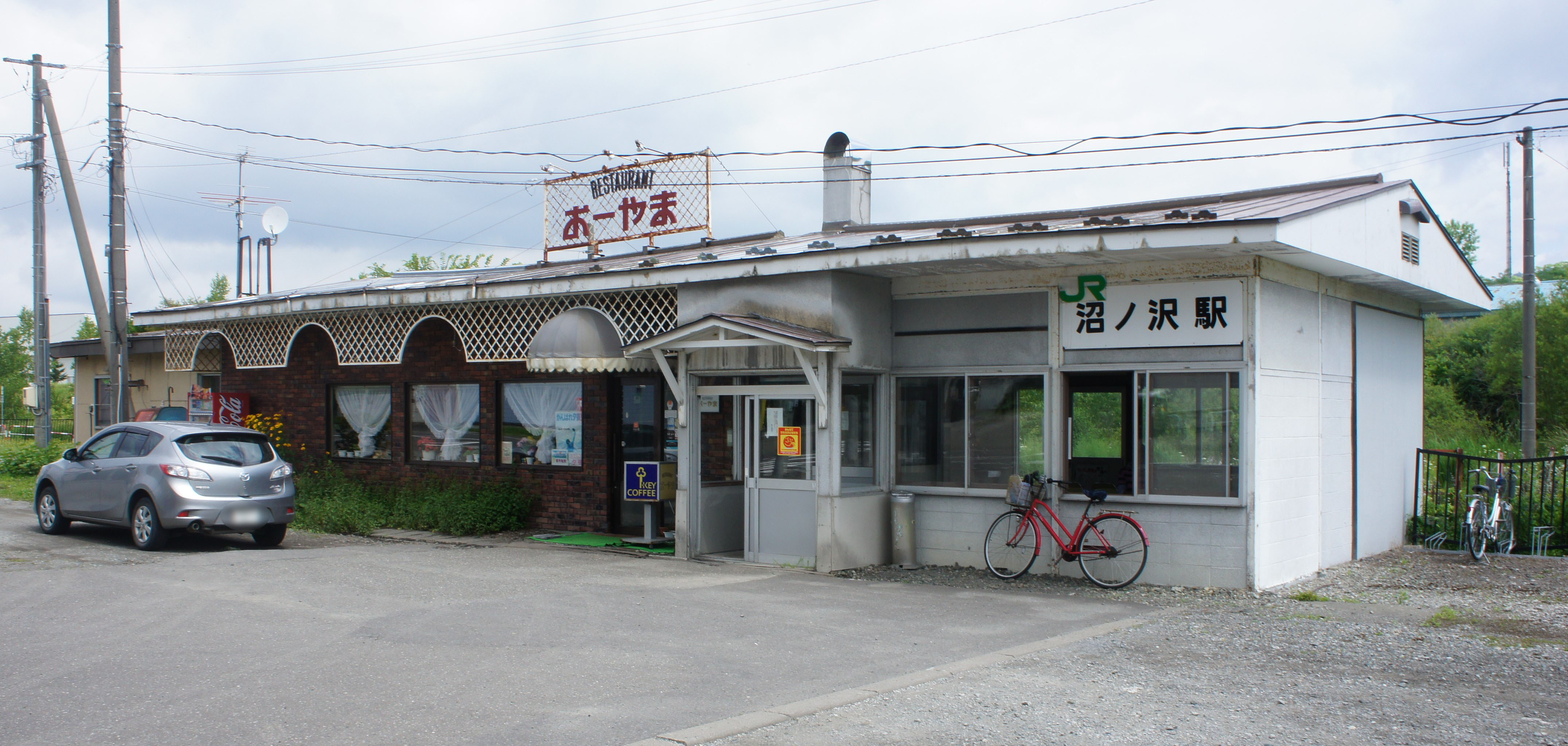 JR石勝線・沼ノ沢駅の駅舎